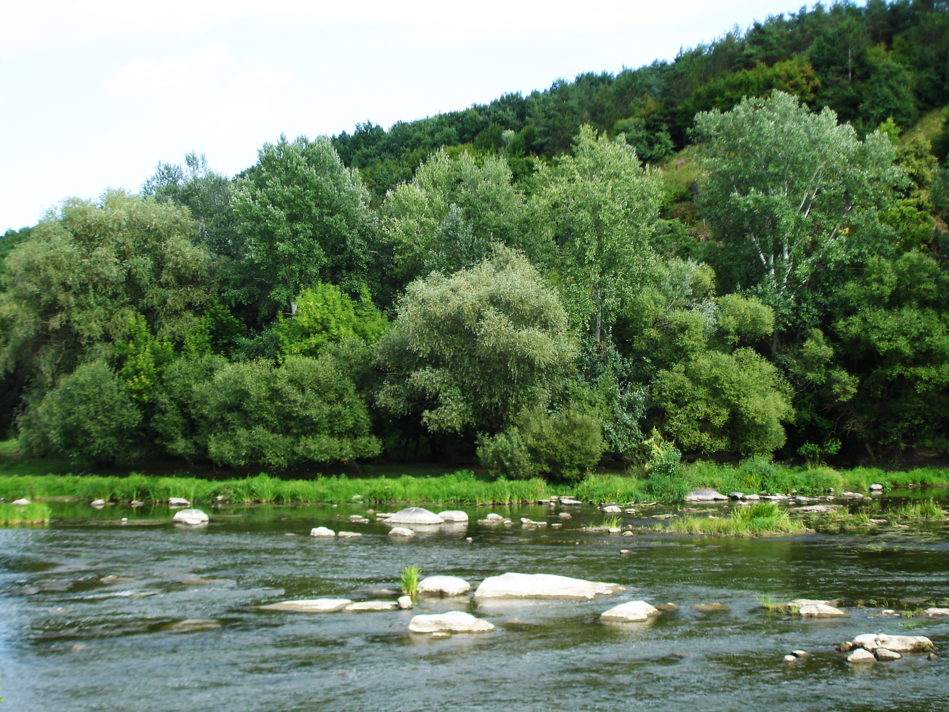 Середнє Побужжя, Тиврівський район: Сутиська селищна рада, Тиврівська селищна рада, Довгополівська с/р, Дзвониська с/р, Шендерівська с/р, Колюхівська с/р, Маловулизька с/р